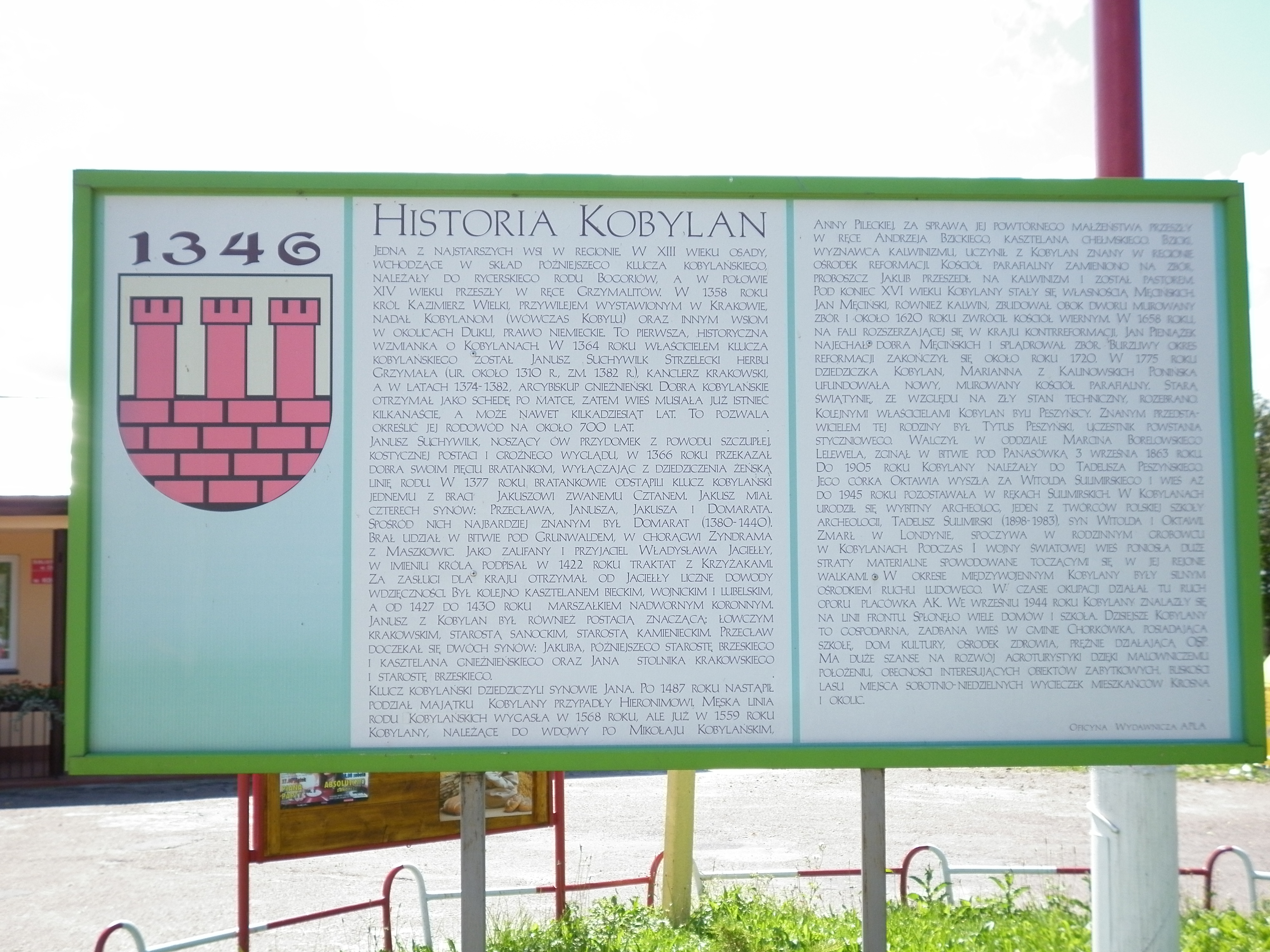 Historia Kobylan